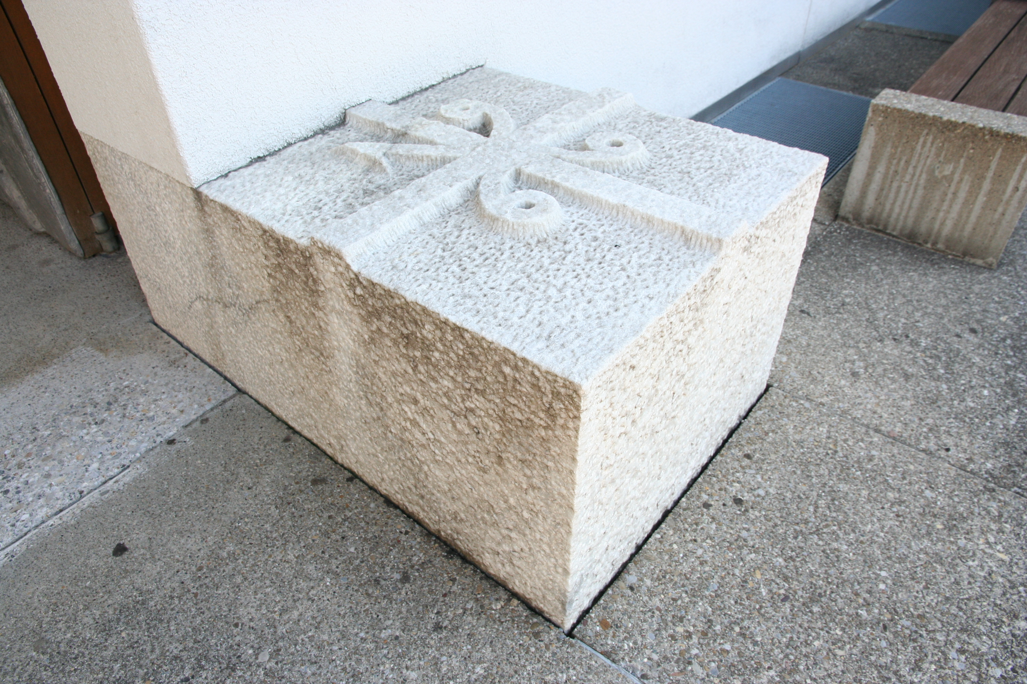 Römisch-katholische Pfarrkirche St. Antonius Münchwilen TG